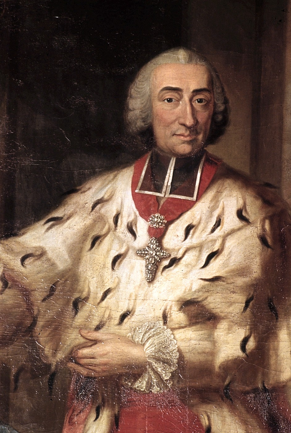 Portrait of Maximilian Friedrich von Königsegg-Rothenfels (1708-1784)